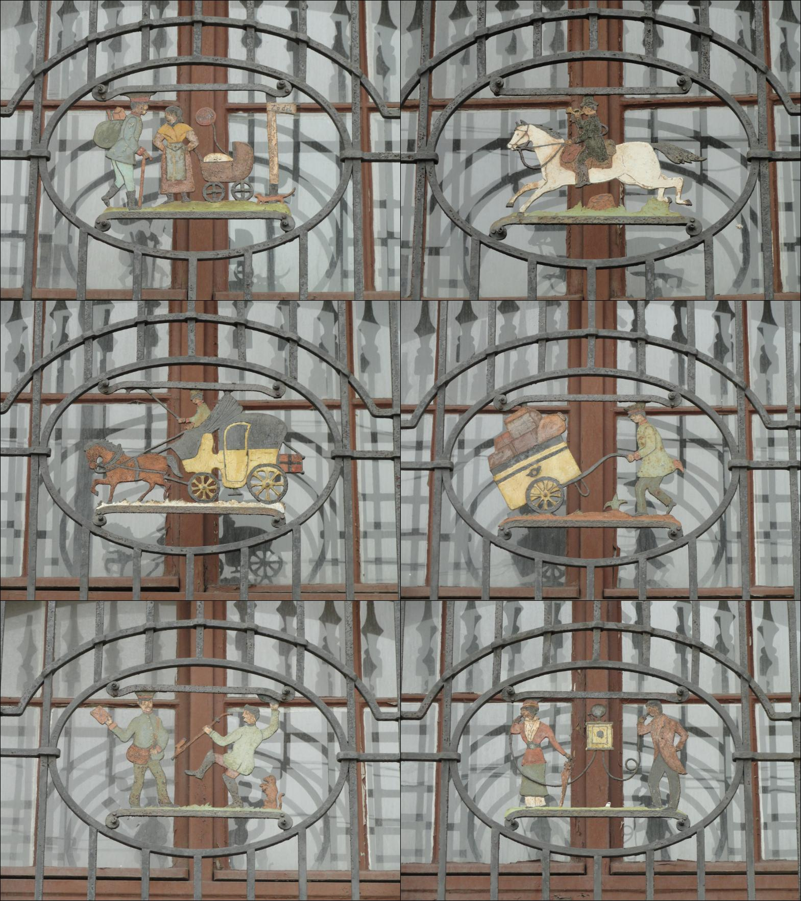 Collage der schmiedeeisernen Gitter am Bahnpostamt in Görlitz